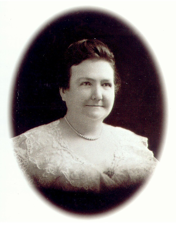 Retrato de la médica y feminista Cecilia Grierson.